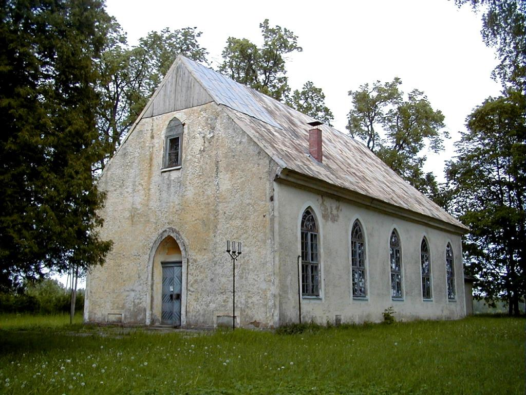 Krapes luterāņu baznīca 2000-05-28